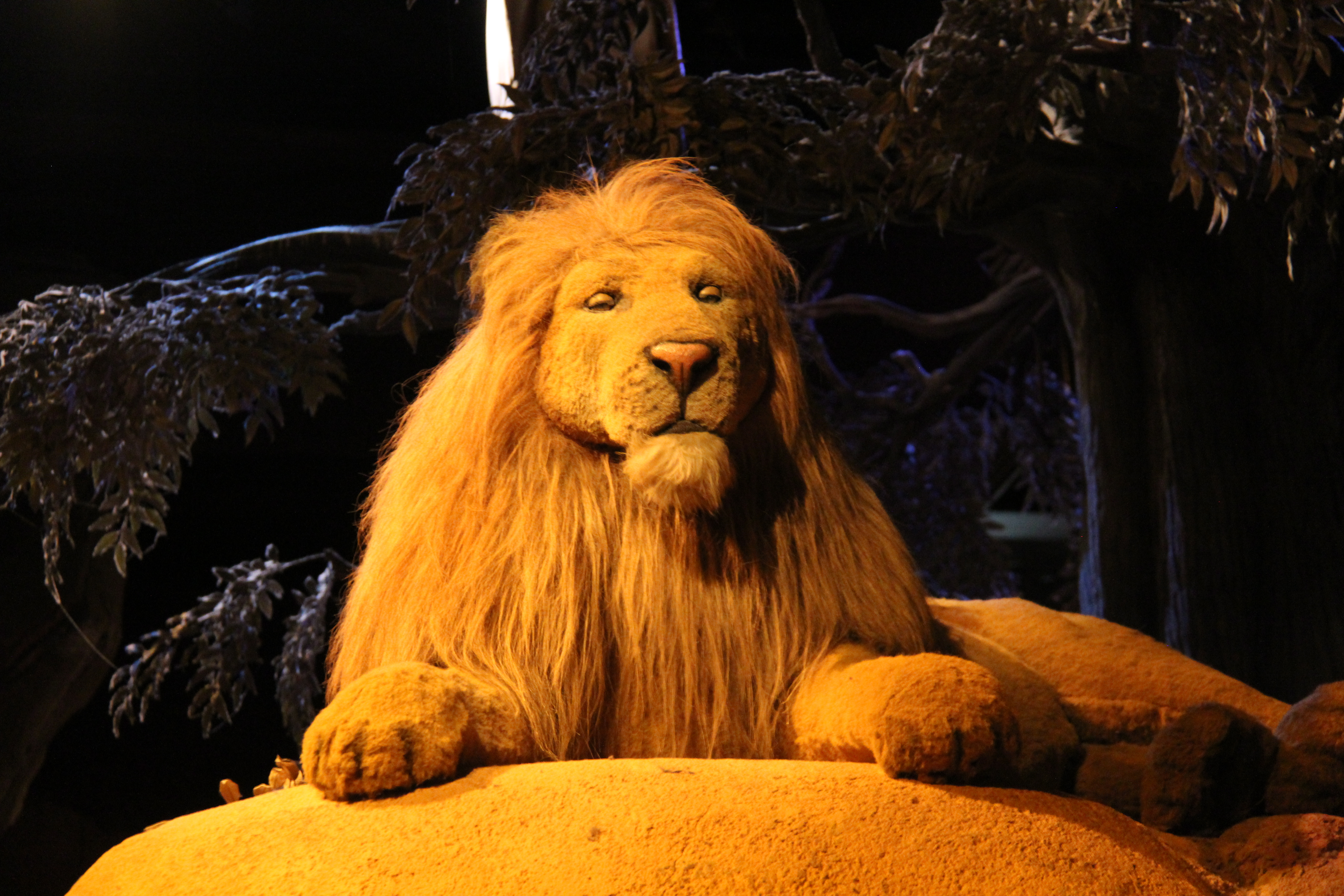 Een animatronic van een leeuw bij de speeltuin van PandaDroom in de Efteling, Dierenwereld